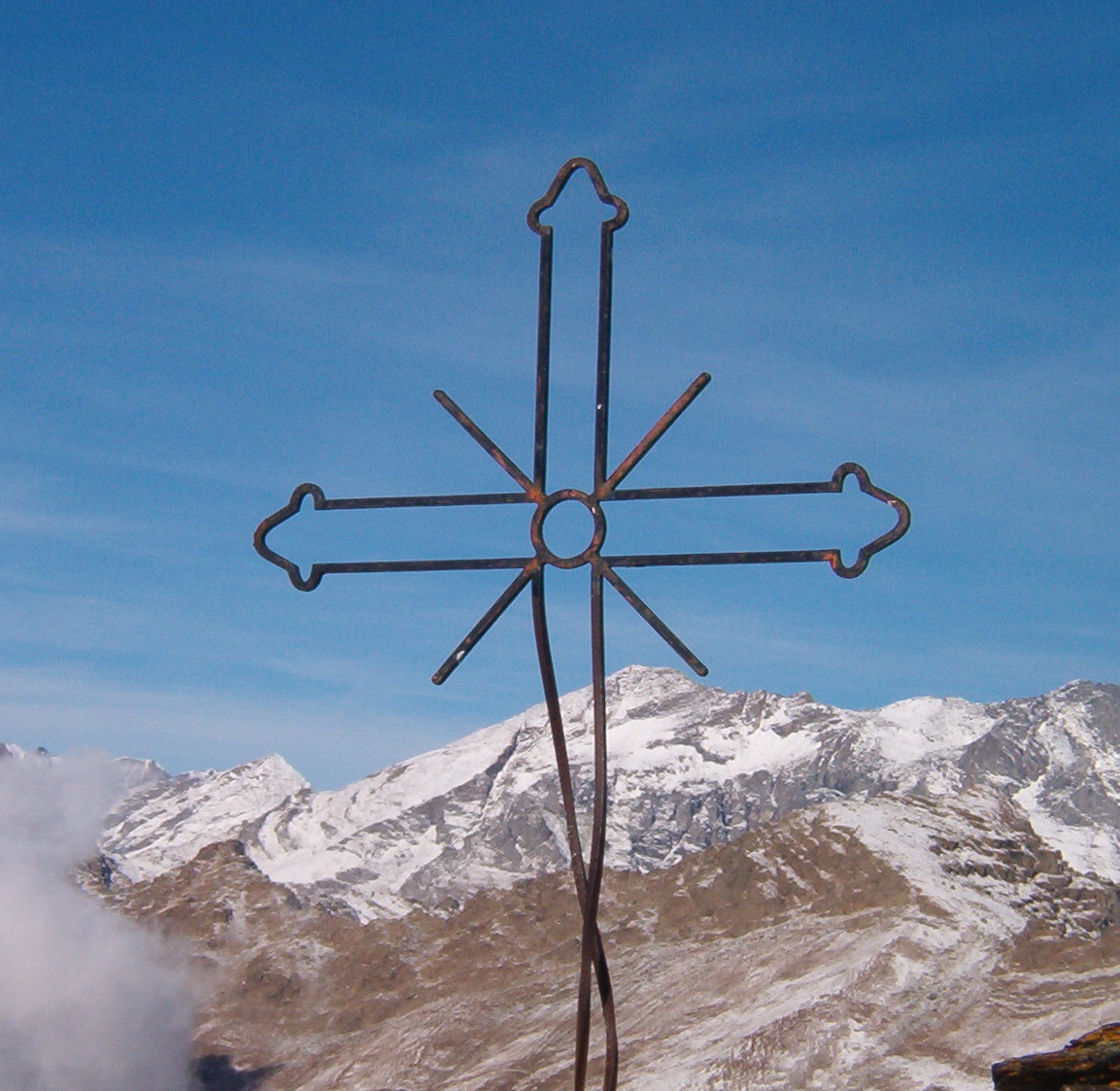 croce in cima ad una montagna